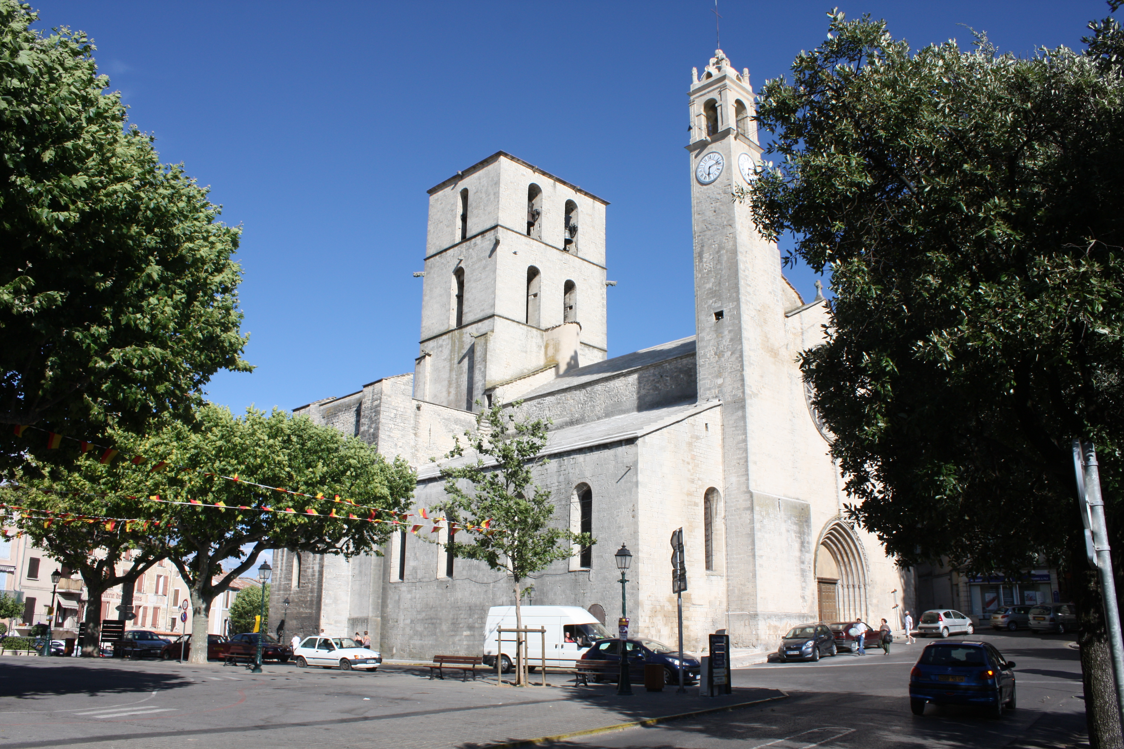 Cathédrale Notre-Dame du Bourguet (Forcalquier)